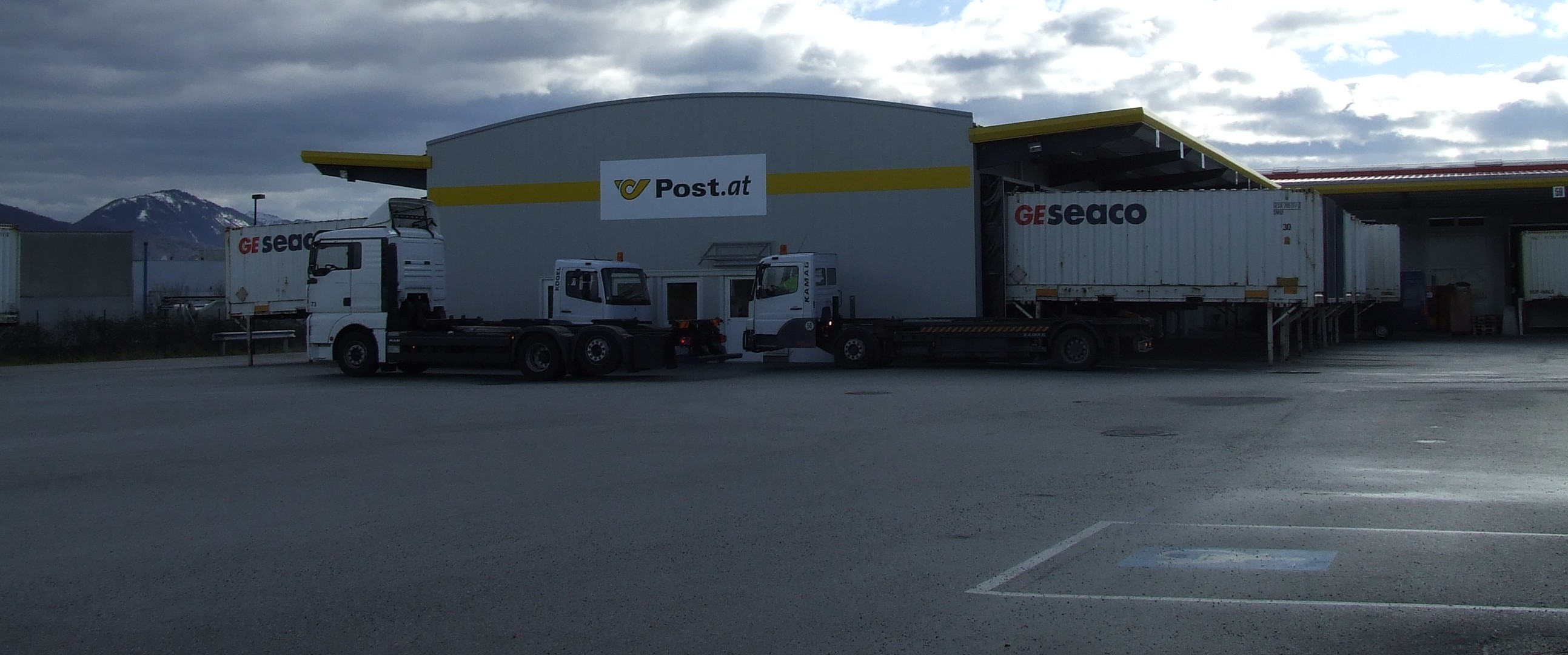 Briefzentrum (Österreich) in Wals-Siezenheim bei Salzburg (Stadt)